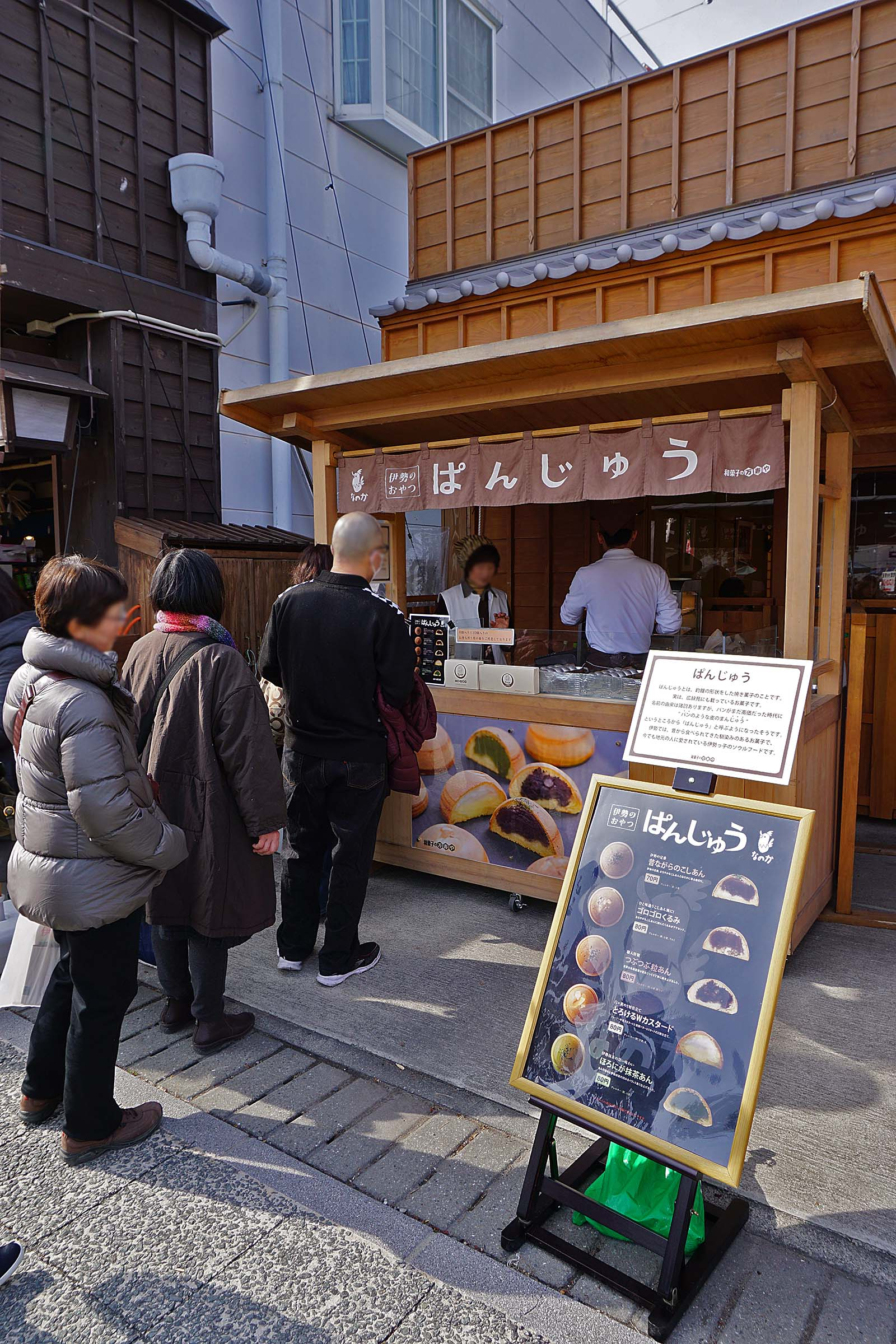 Nakano Pan-Jyu shop , なかのぱんじゅう